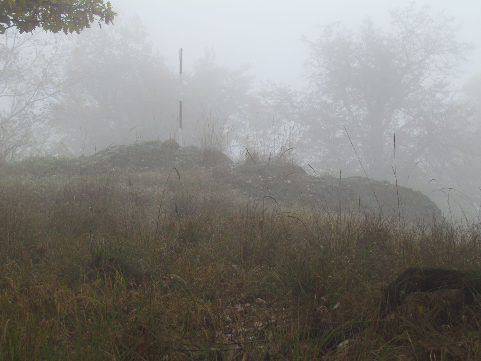 Vrchol Vlastce